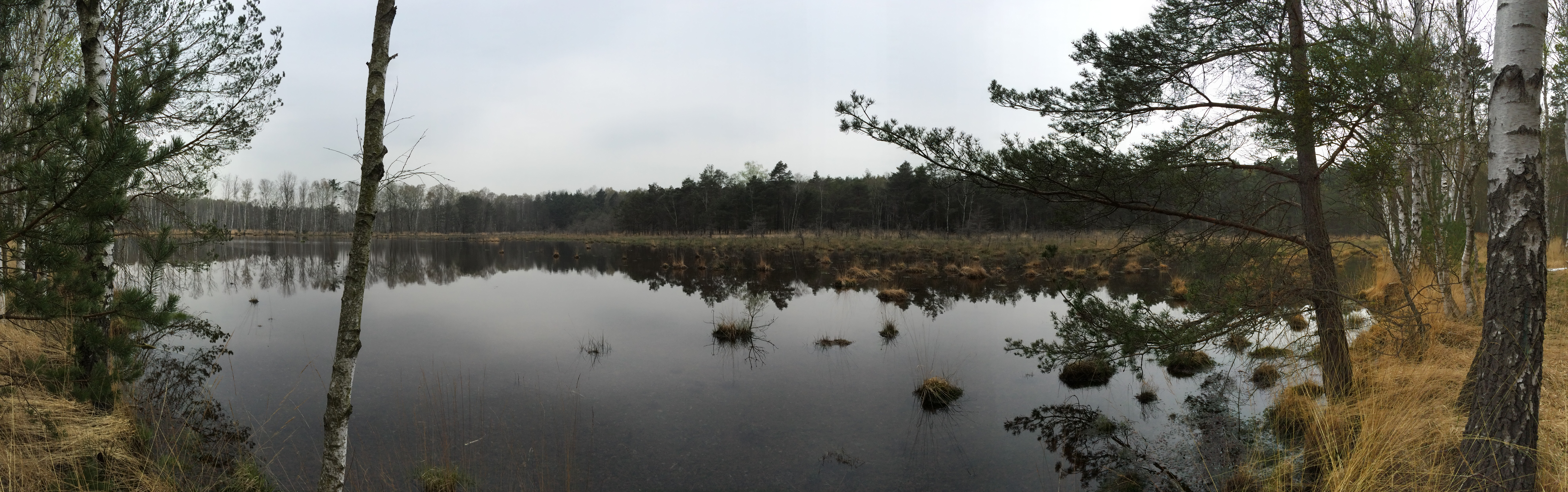 See im Naturschutzgebiet „Hohenleipisch“. Das Gelände stellt heute ein noch typisches kleines Auerwild-Biotop dar. Die militärischen Altlasten im Gebiet sind immer noch sehr hoch und einige Flächen weiterhin gesperrt. Seit 2004 sind 169 Hektar als Naturschutzgebiet „Hohenleipisch“ unter Schutz gestellt.